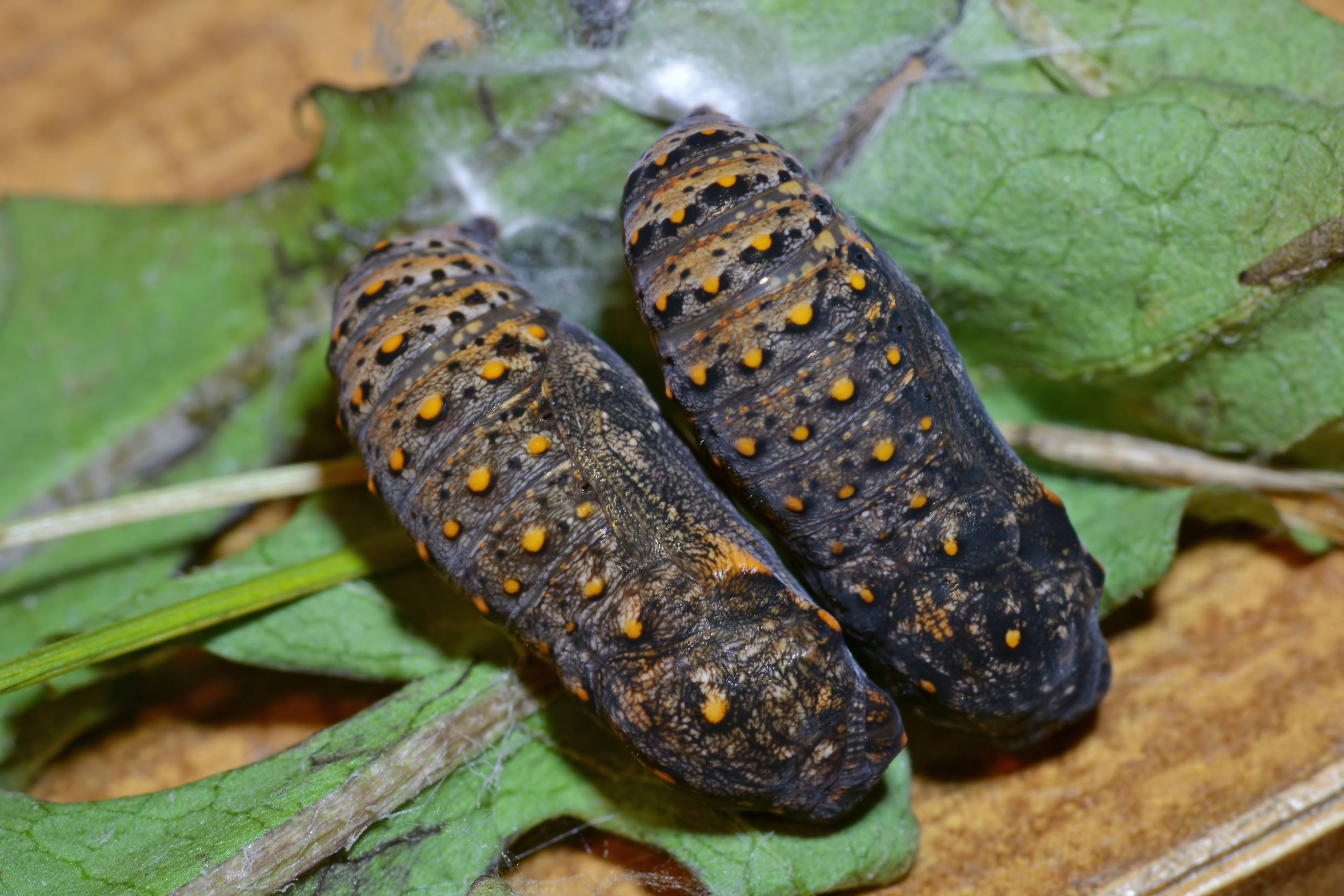 2 Puppen des Wegerich-Scheckenfalters (Melitaea cinxia), Draufsicht